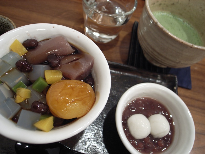 日記